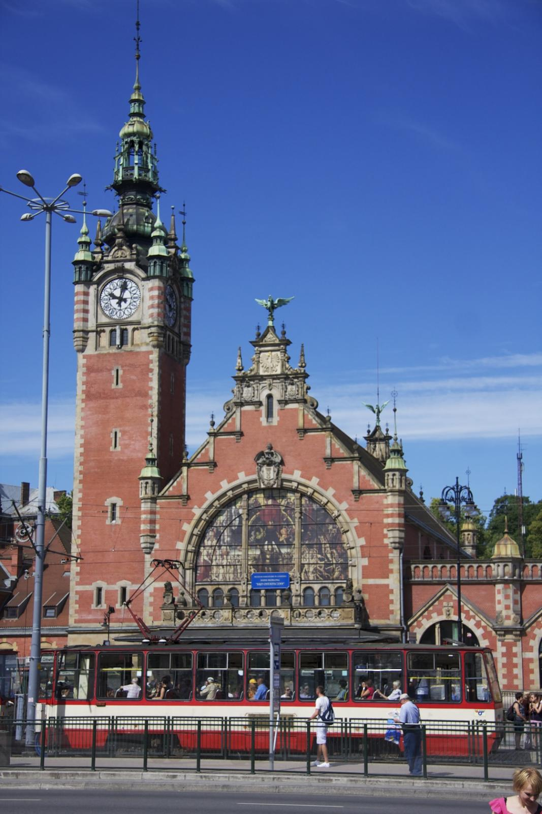 Gdańsk Główny i tramwaj Konstal 105Na.